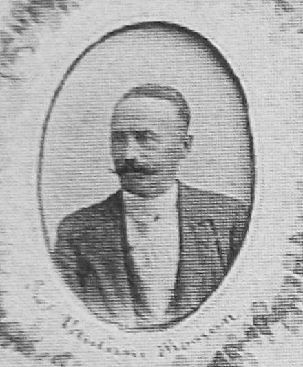 Roman Vetulani (fotografia zaczerpnięta z tableau abiturientów C. K. Gimnazjum w Sanoku w roku szkolnym 1897/1898.